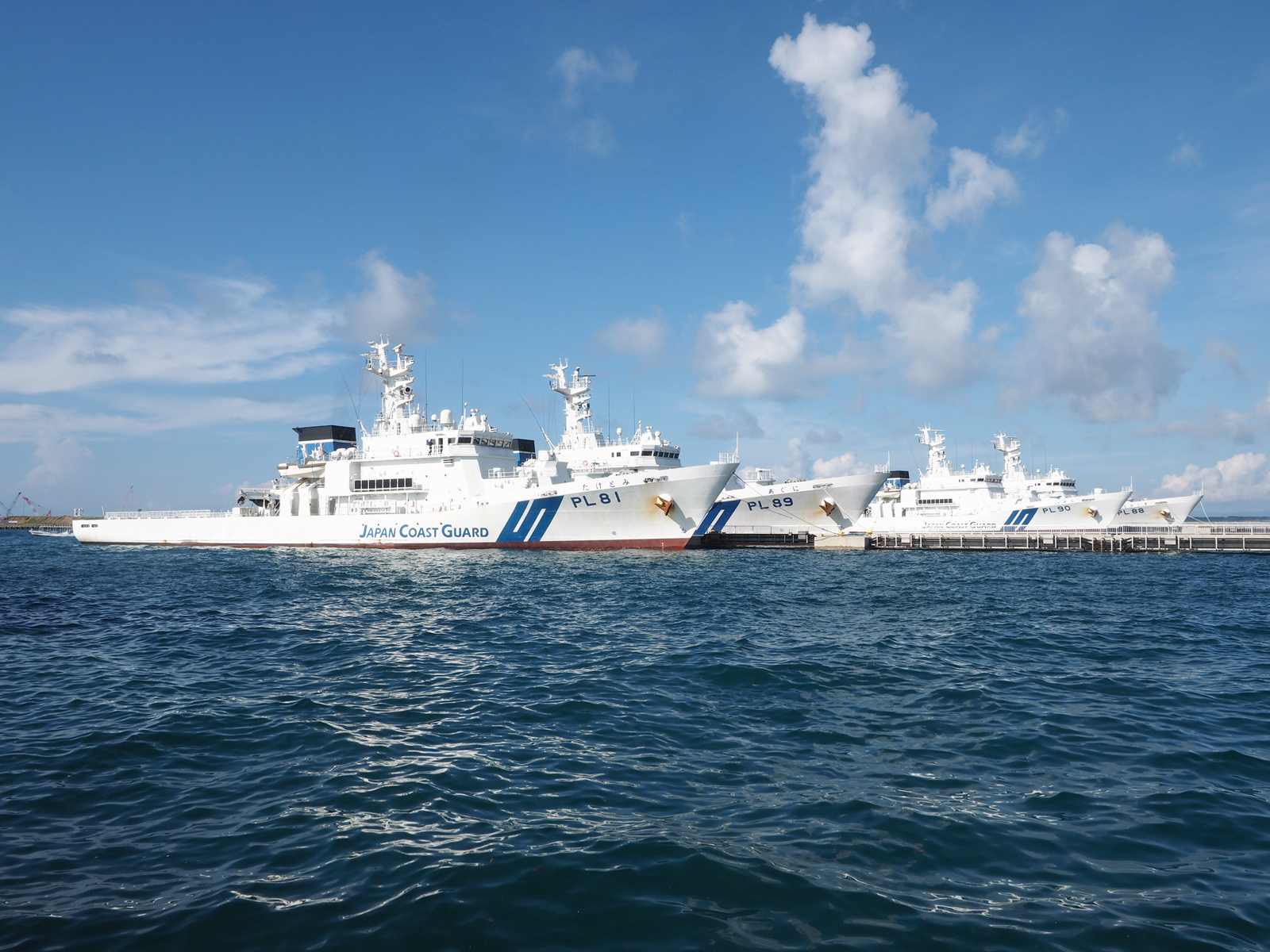 海上保安庁第十一管区海上保安本部石垣海上保安部・尖閣領海警備専従体制の巡視艇 たけとみ（PL81）、とかしき（PL88）、いぜな（PL89）、あぐに（PL90） （沖縄県石垣市石垣港）